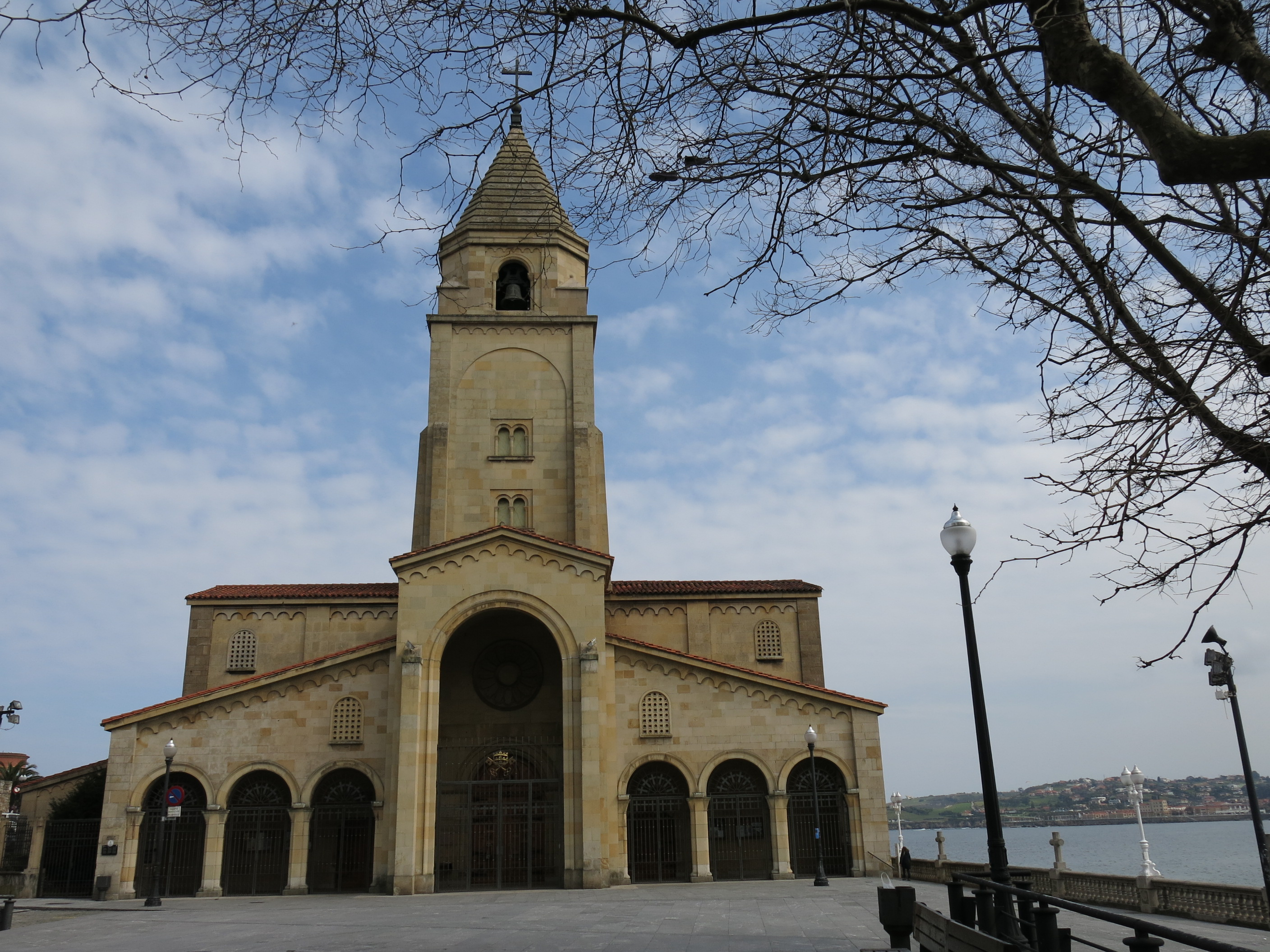 Conjunto Histórico Artístico El Barrio Viejo de Gijón